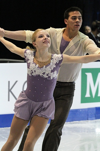 Кэтрин Бобак и Йэн Бехарри на финале Гран-при среди юниоров сезона 2011-2012